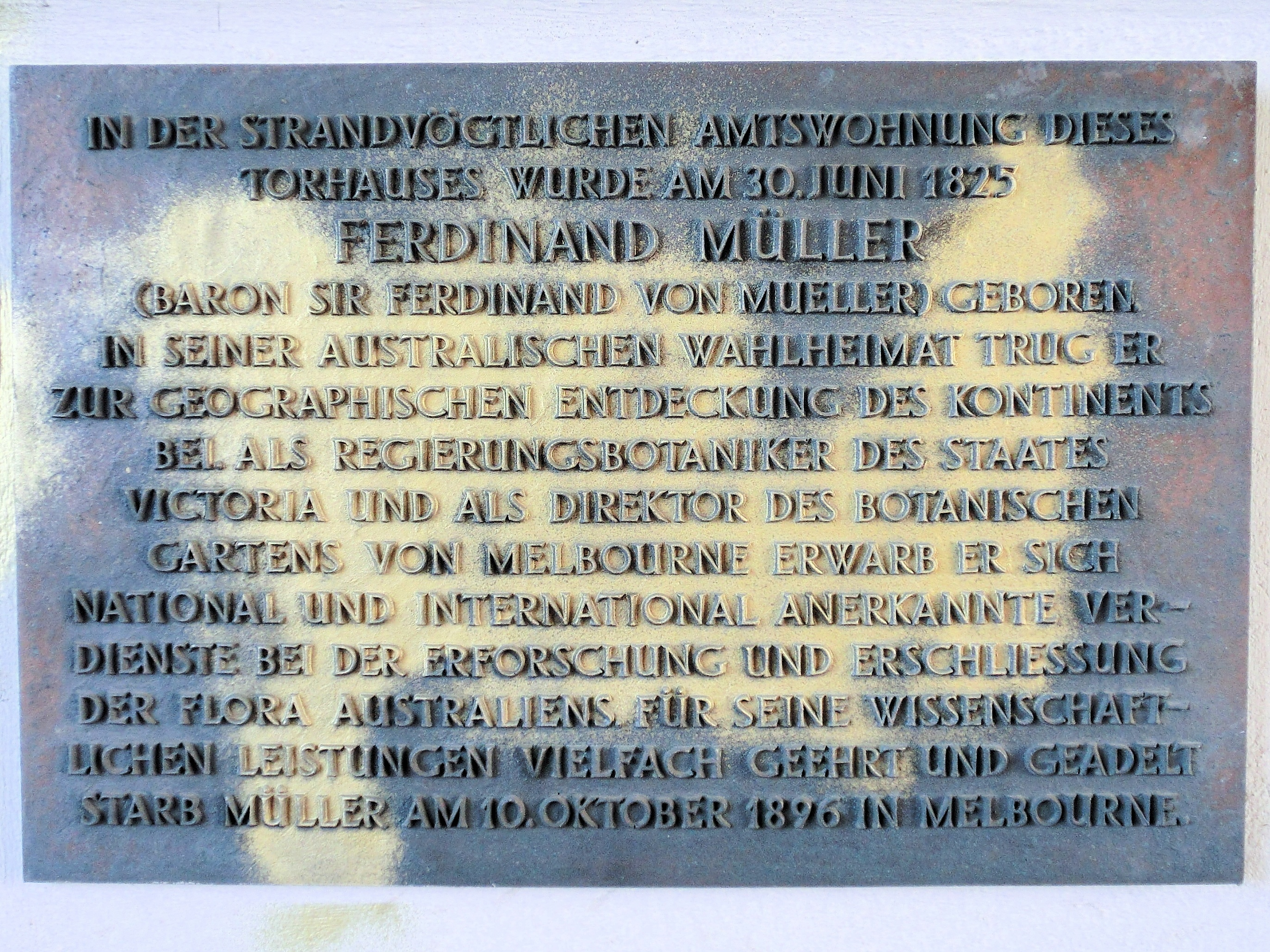 Rostock, Mönchentor, Gedenktafel für Ferdinand Müller